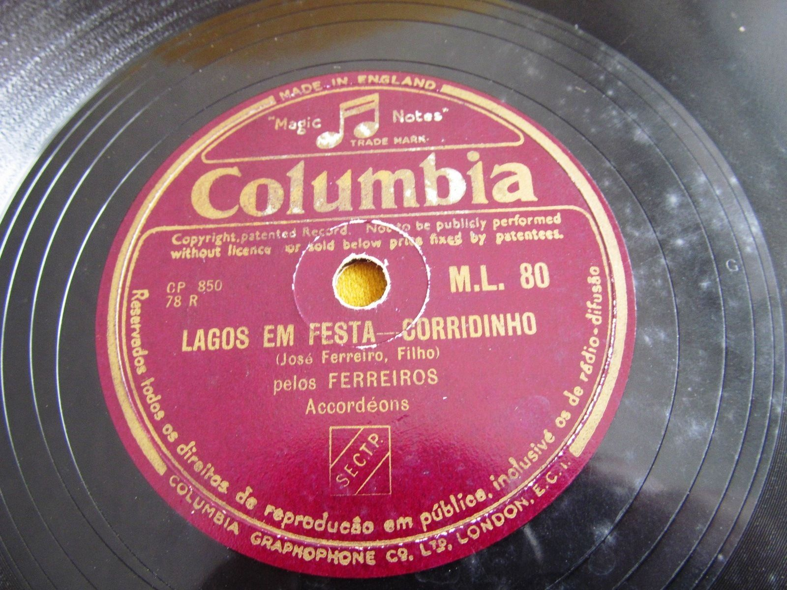 Disco Columbia de 78 rot.Lagos em Festa, de José Ferreiro Júnior,pelos Ferreiro